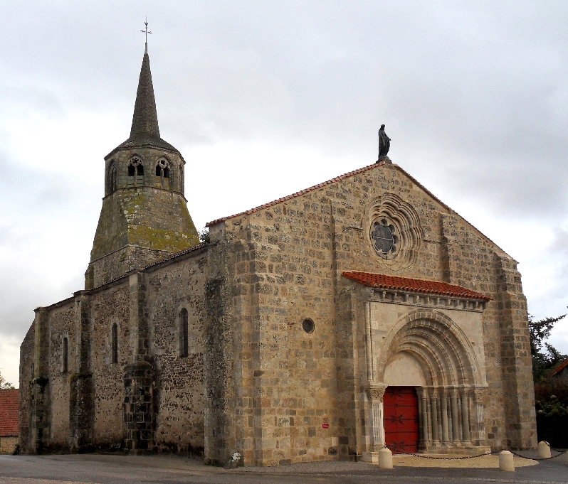 Église Notre-Dame (Classé) .